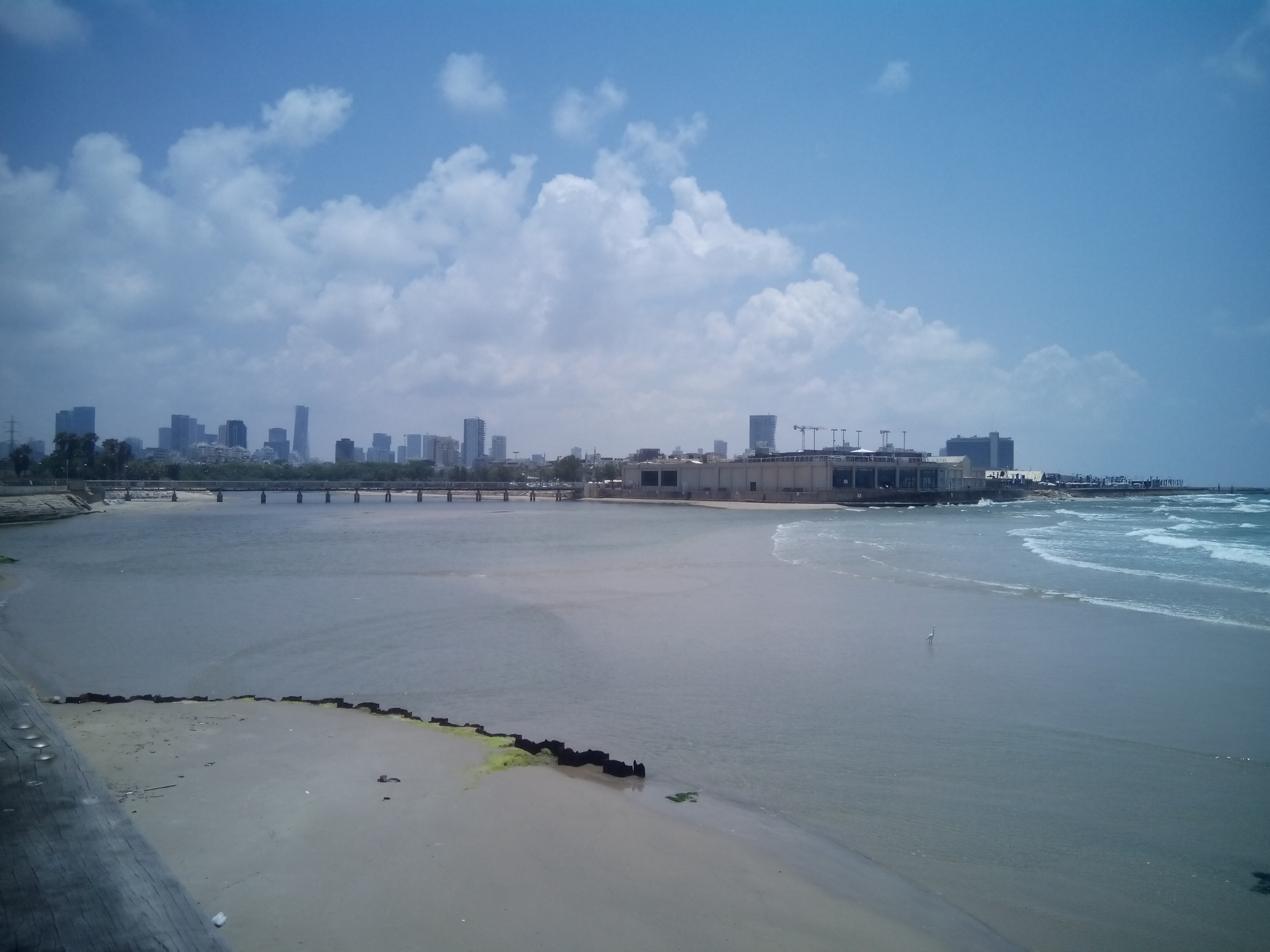 Собственное фото.